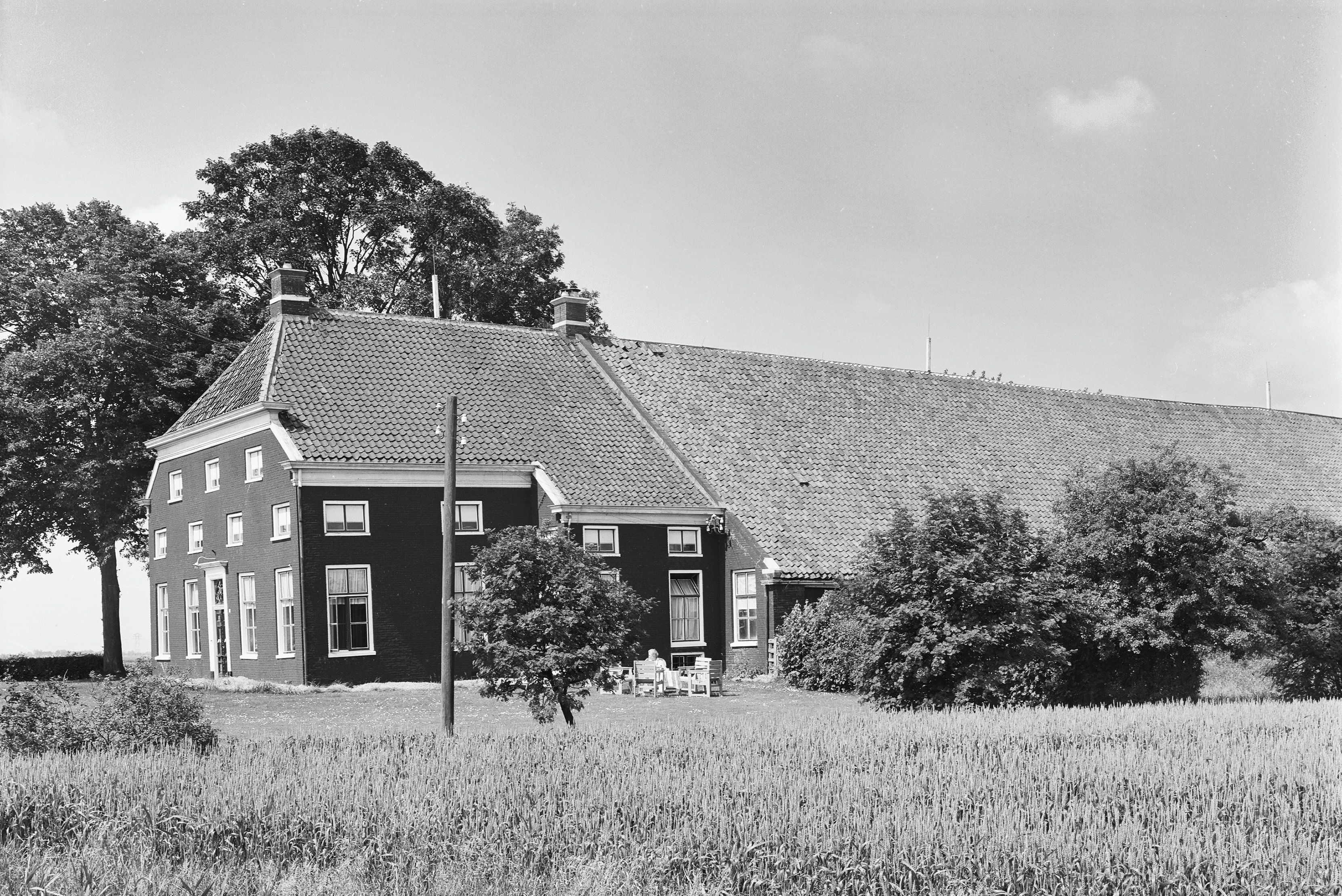 aanzicht